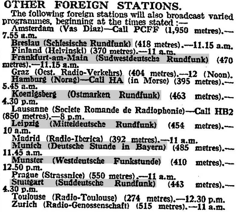 Radioprogramm der TIMES, Rubrik der "anderen ausländischen Sender", also der Sender mit nicht höchster Priorität. Nachträglich hervorgehoben: die deutschen Sender